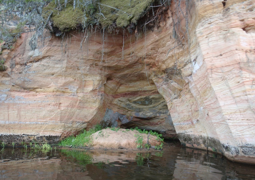 Oosemäe koobas 2015 mais